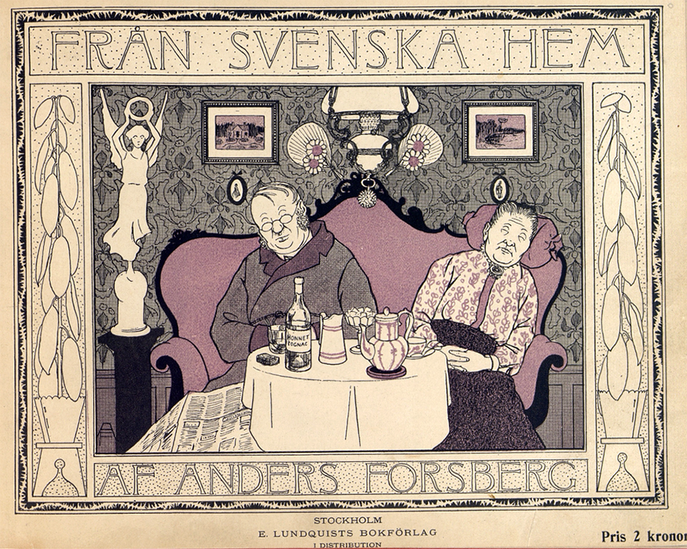 Forberg, Anders, Från svenska hem. Book cover